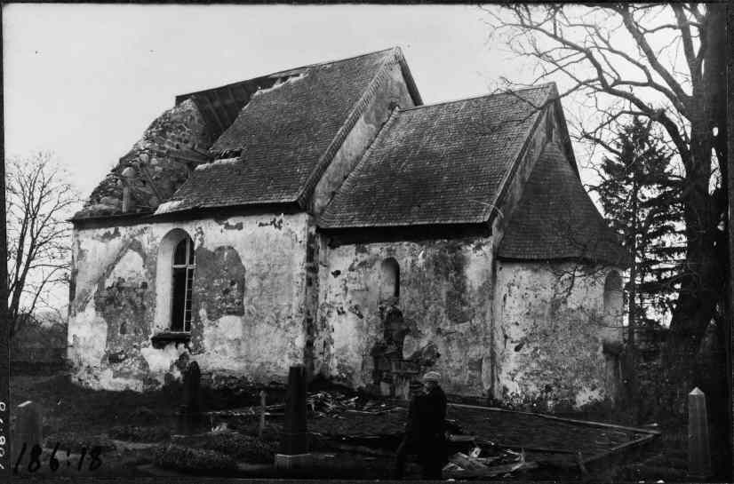 Kyrkan från sydöst